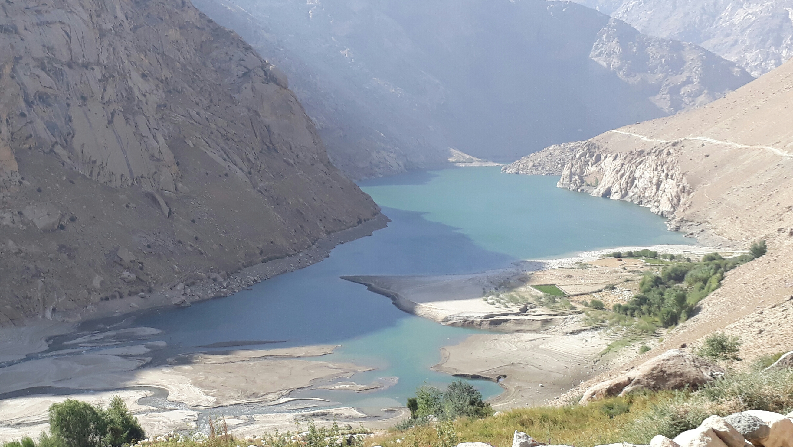 weghnan pool